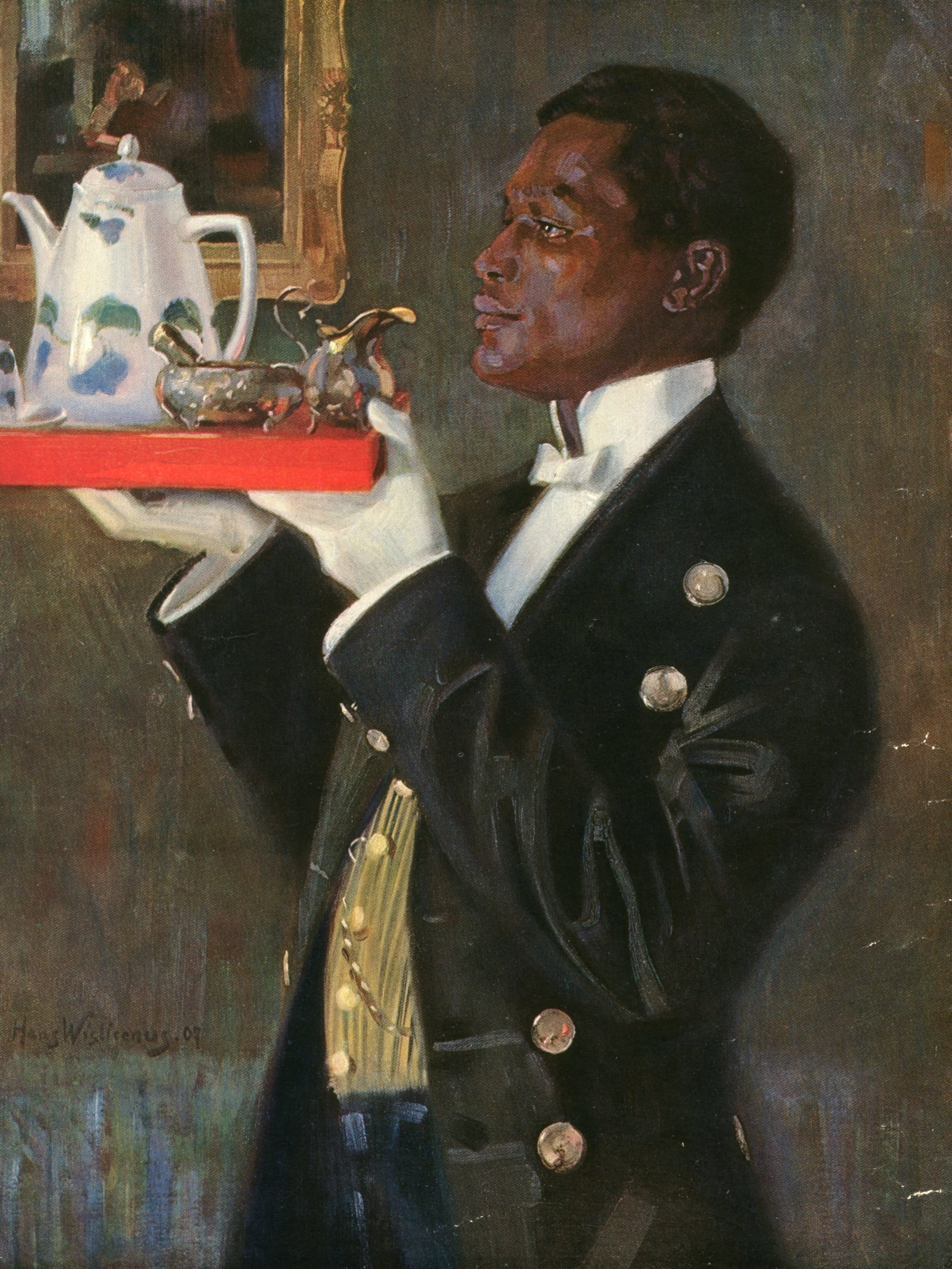 Gemälde "Das rote Tablett" von hans Wislicenus (1907)